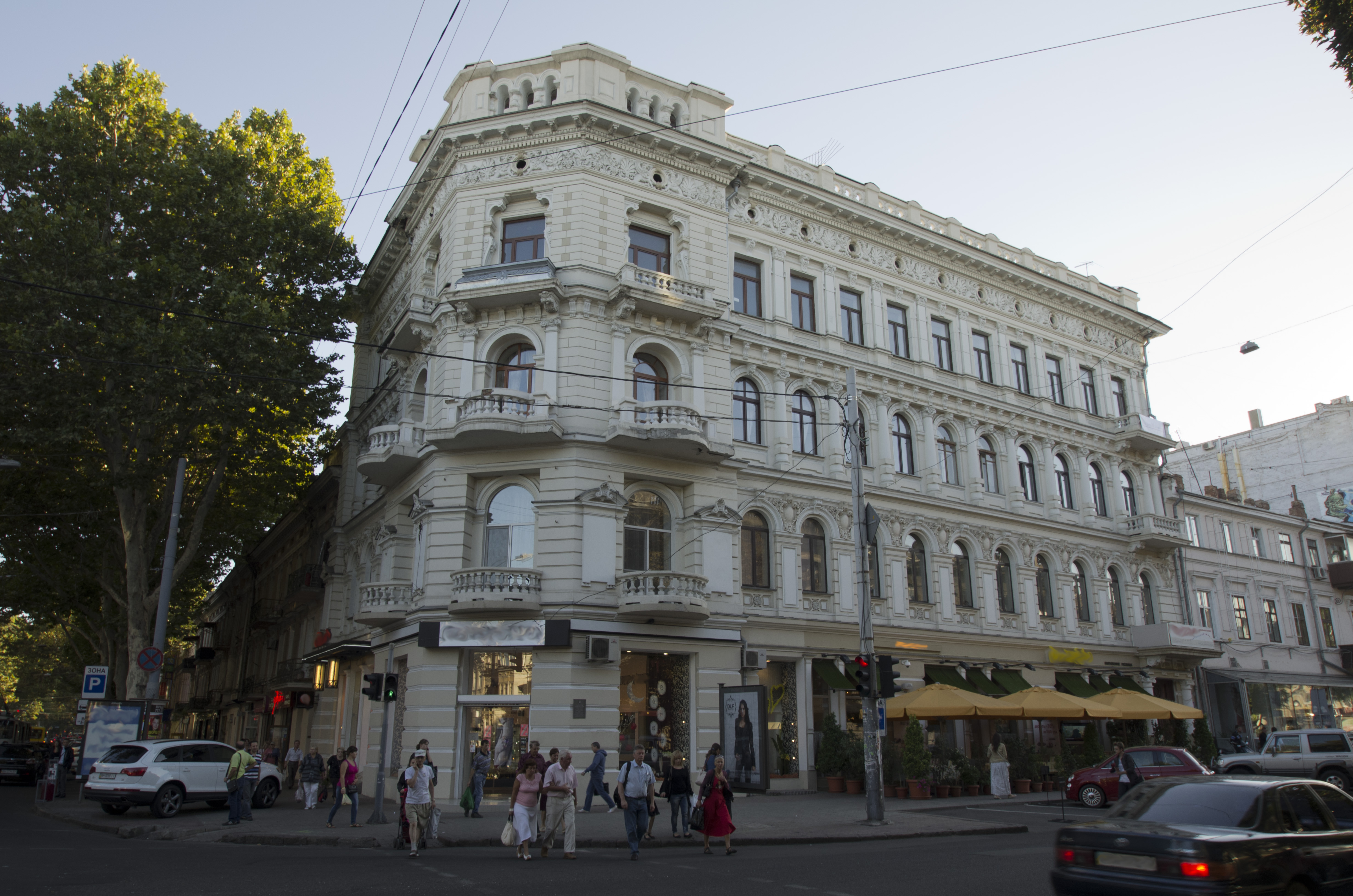 Будинок прибутковий Маврокордато